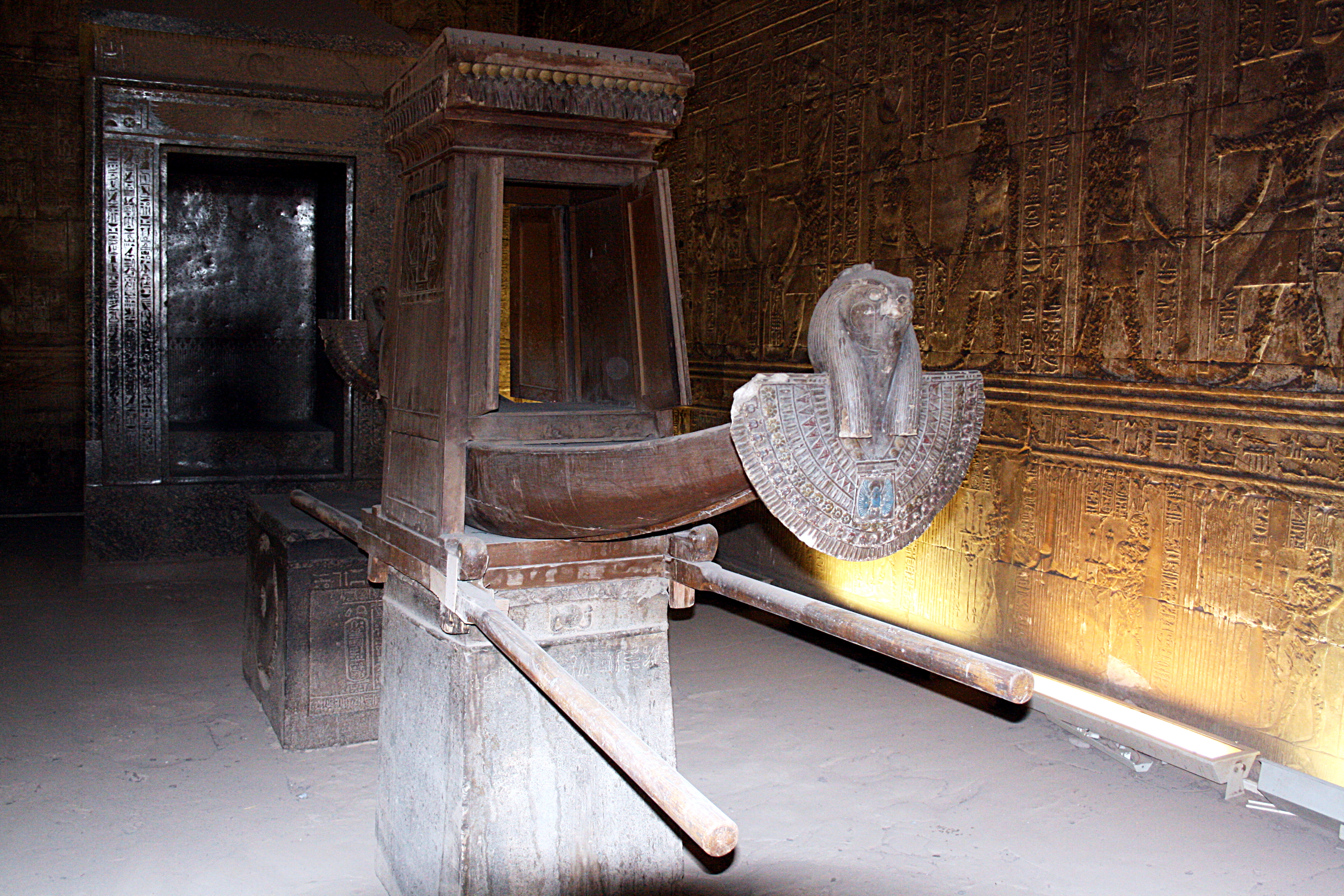 Edfu_Tempel,_Sanktuarium